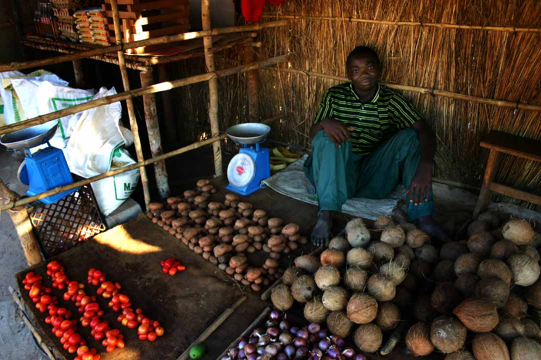 Makhuwa boy selling produce, Mozambique.Mozambique